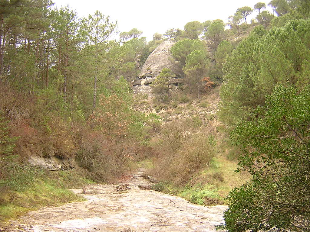 El Torrent de Colljovà (Monistrol de Calders, Moianès)